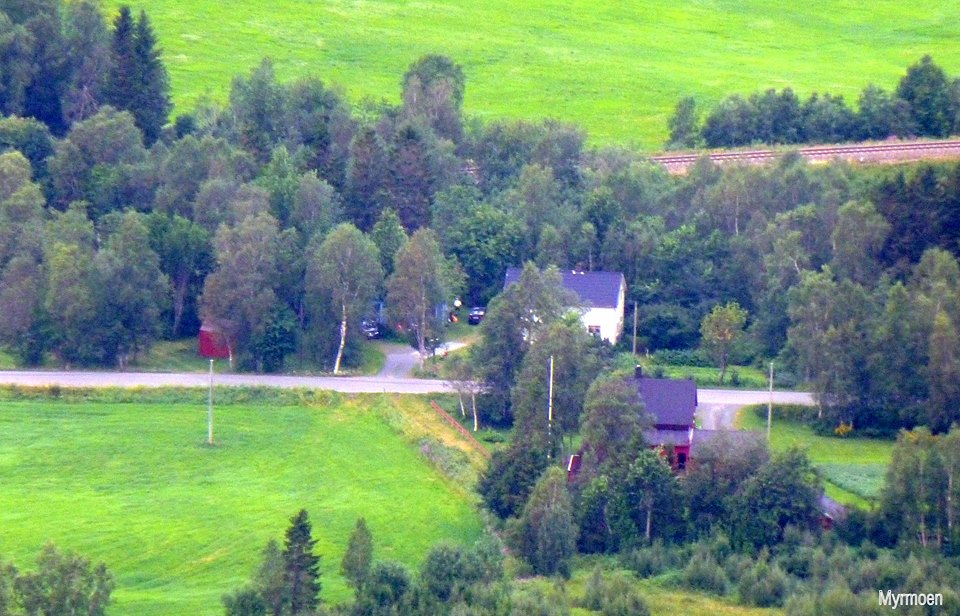 Myrmo